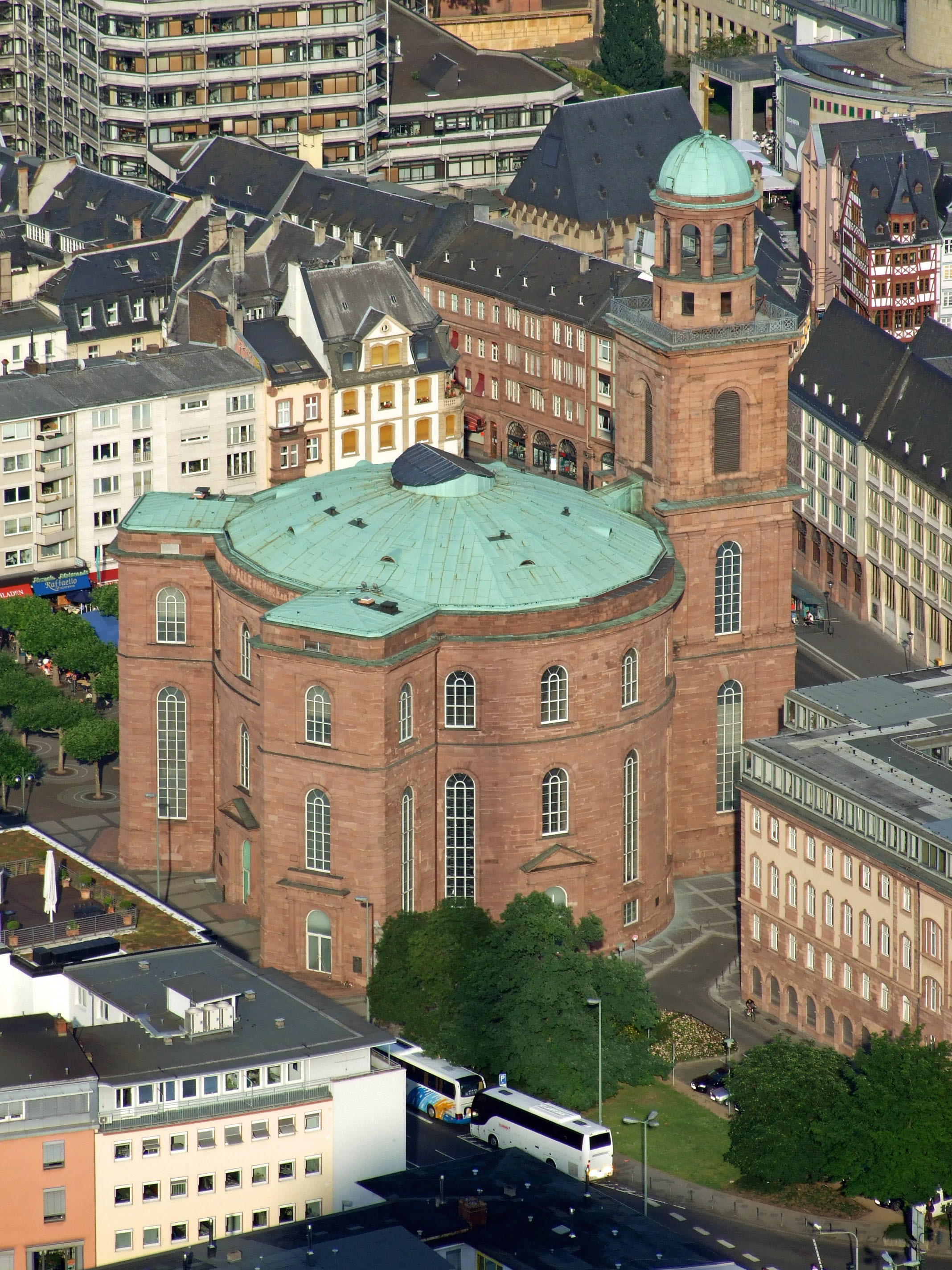 Die Paulskirche vom MAIN TOWER gesehen